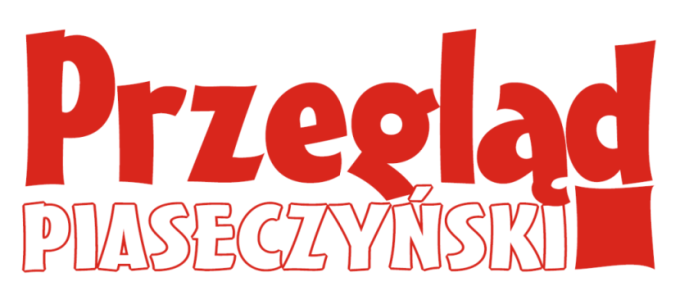 logo tygodnika Przegląd Piaseczyński